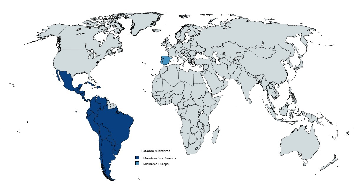 mapa Estados miembros OIJ